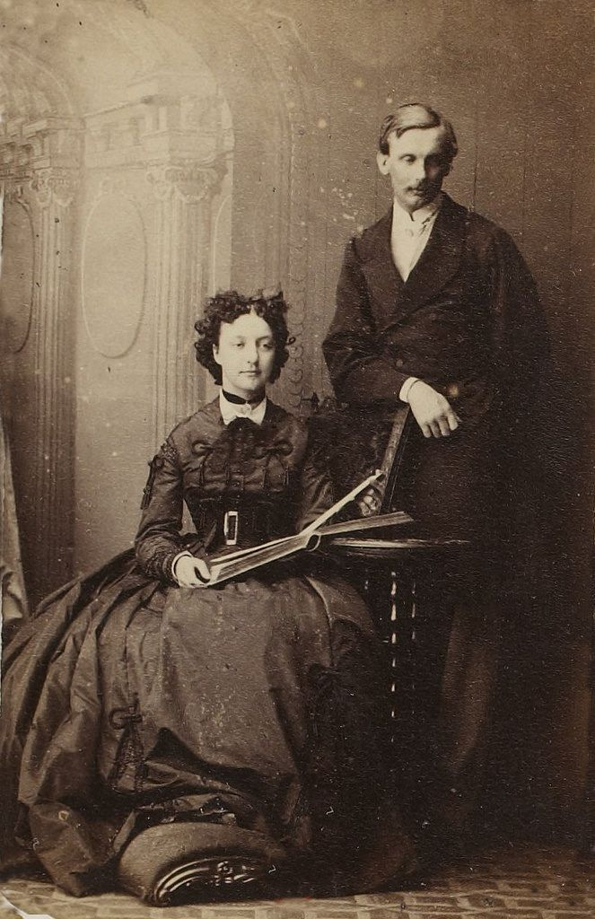 Robert d'Orléans e Francisca d'Orléans, duques de Chartres